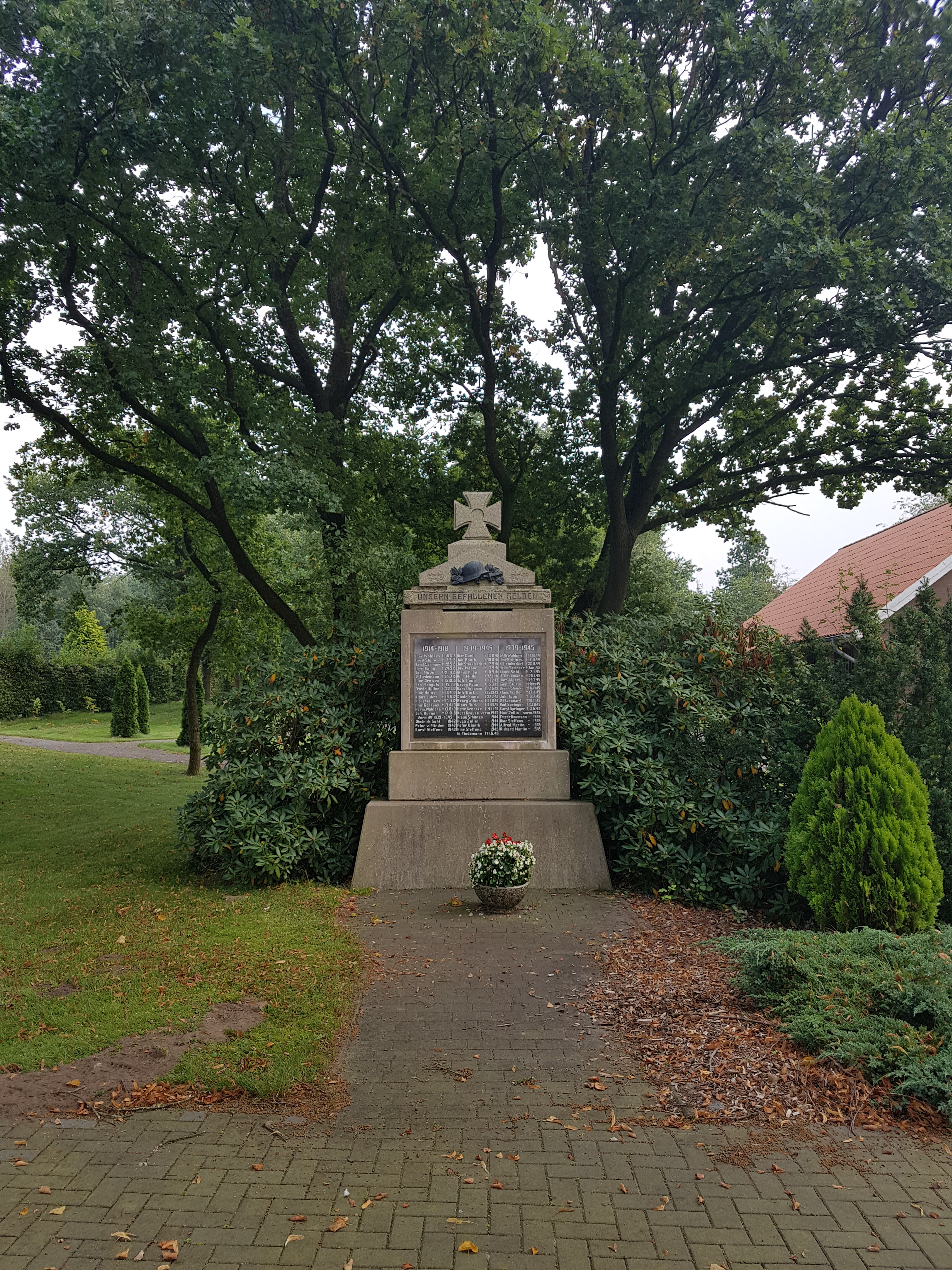 Kriegerdenkmaal an’n Karkhoff in Hollen